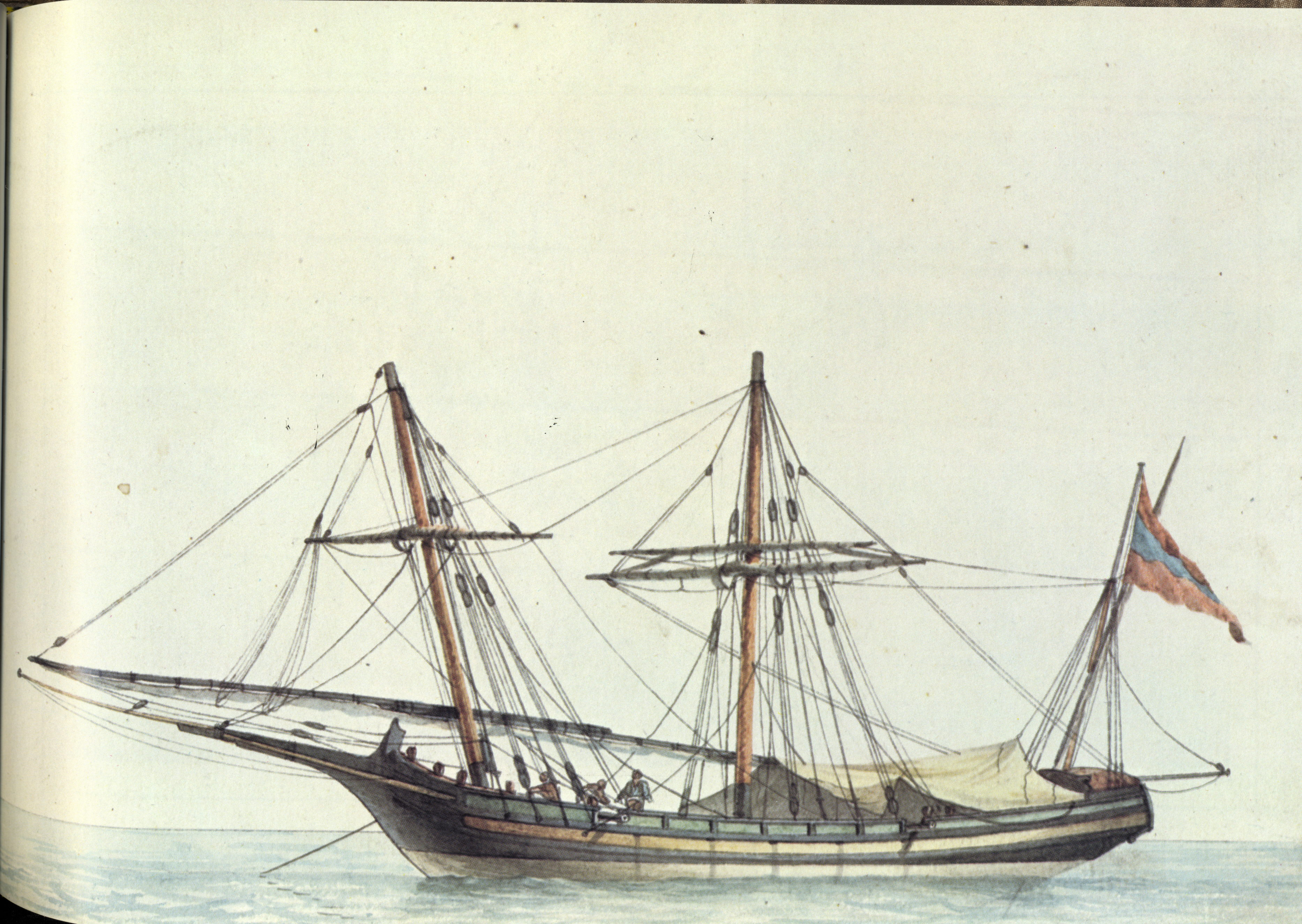 Ottoman-Greek Shebek, 1796